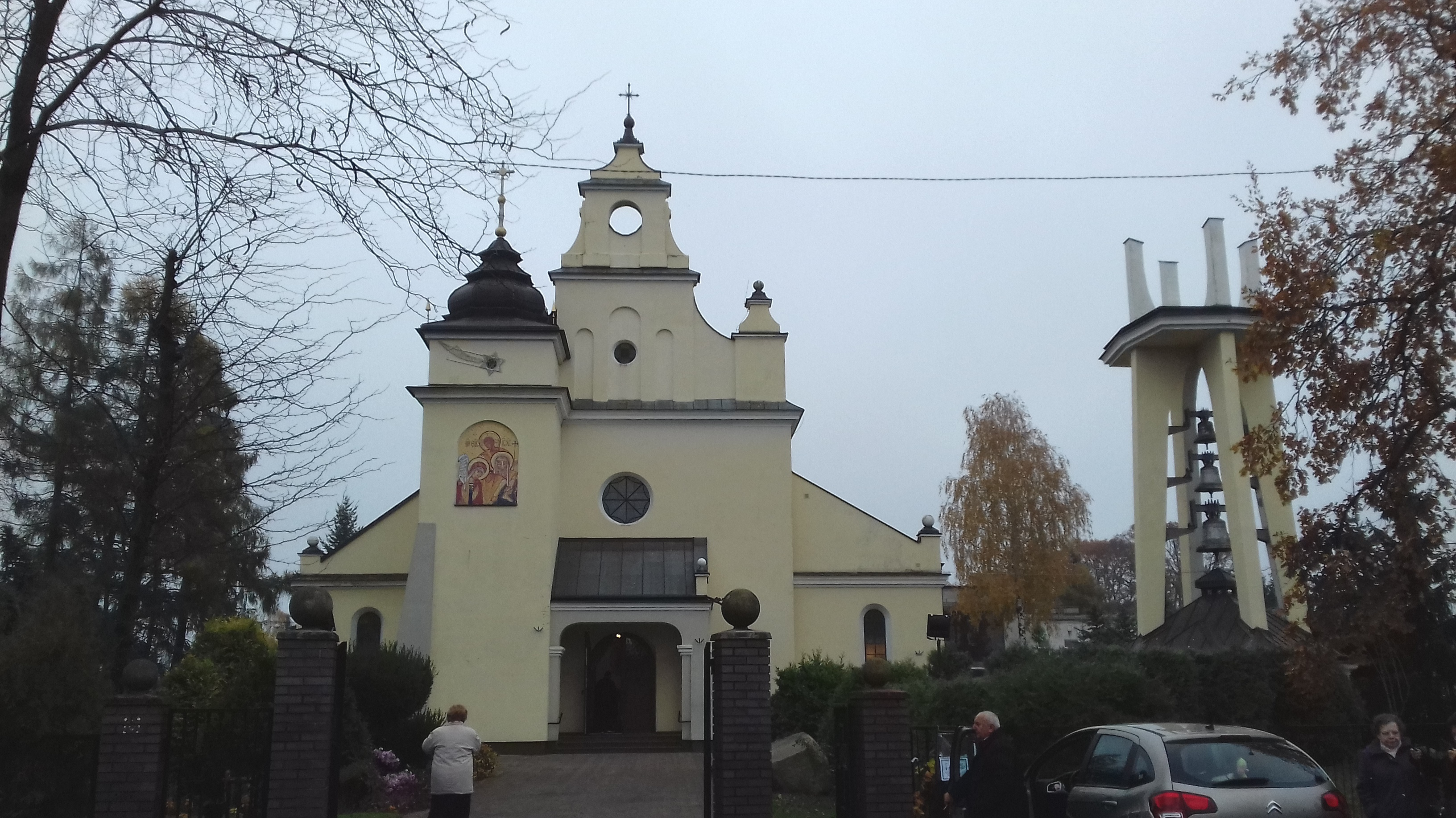 Jaktorów (gm. Jaktorów, pow. Grodzisk Mazowiecki) - kościół Św. Stanisława BM